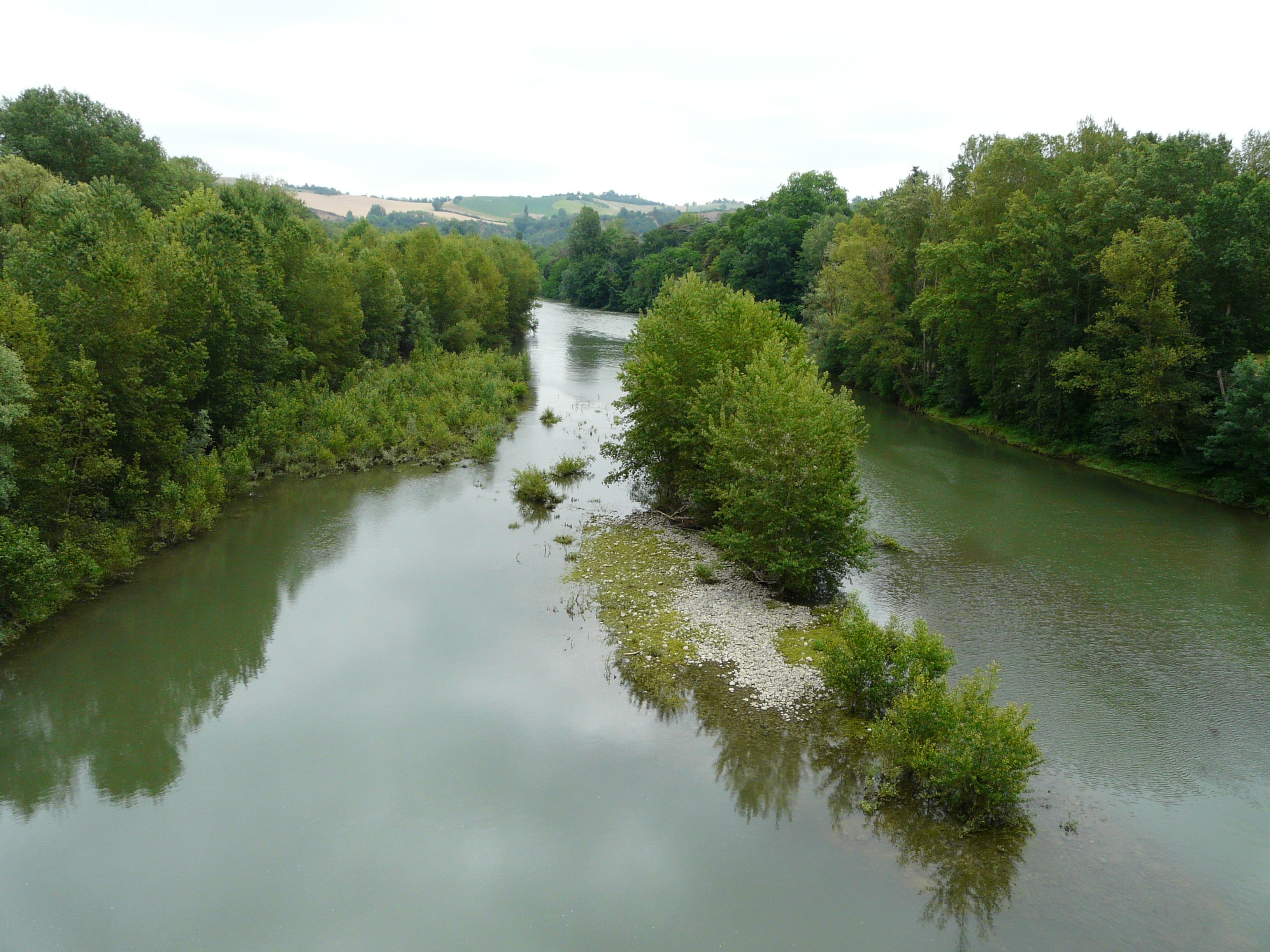 La Garonne en aval du pont de la route départementale 627, Carbonne, Haute-Garonne, France.